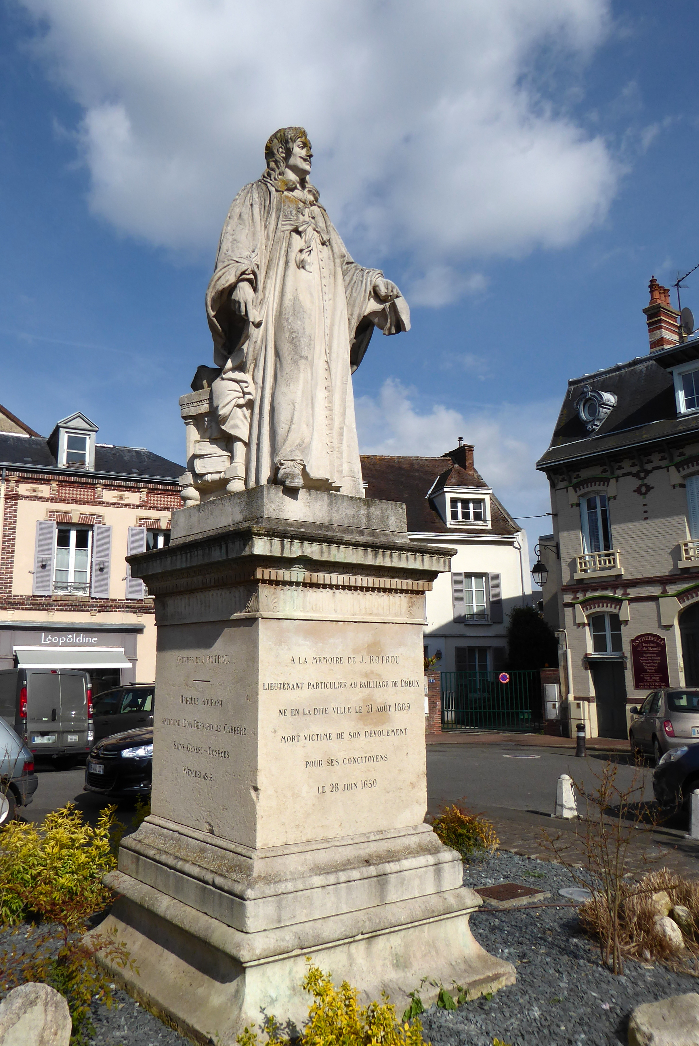 Statue Jean de Rotrou, Dreux, Eure-et-Loir (France). "A la mémoire de J. Rotrou lieutenant particulier au bailliage de Dreux né en la dite ville le 21 août 1609 mort victime de son dévouement pour ses concitoyens le 28 juin 1650" "Oeuvres de J. Rotrou - Hercule mourant / Antigone-Dom Bernard de Cabrère / Saint-Genest-Cosroès / Venceslas".